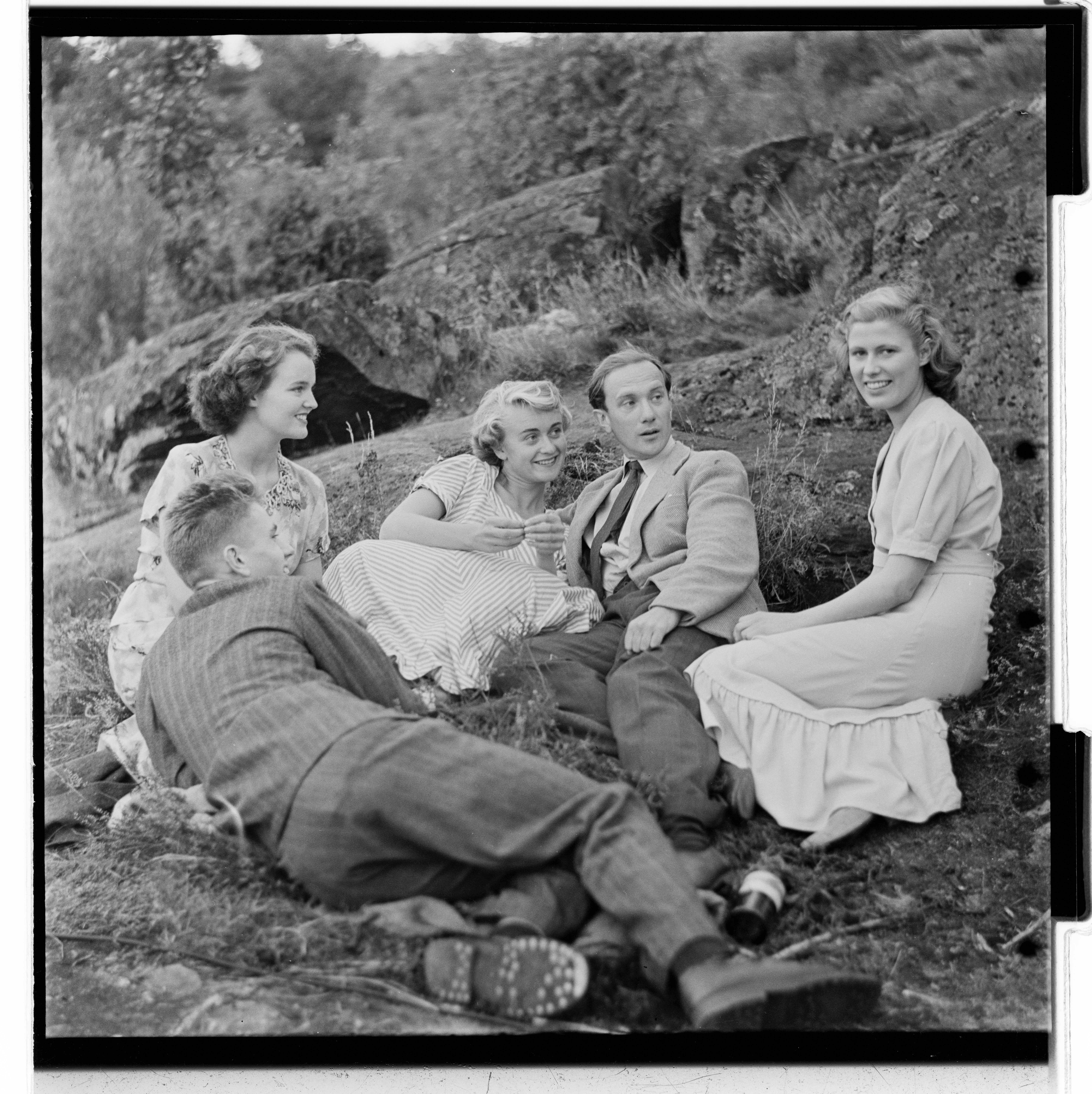 Bildet er hentet fra Arkivverket. Foto fra innspillingen av den norske filmen "Andrine og Kjell". Arkivinstitusjon : Riksarkivet Arkivnavn : Billedbladet NÅ Sted : Norge, Ukjent, Ukjent, Avbildet